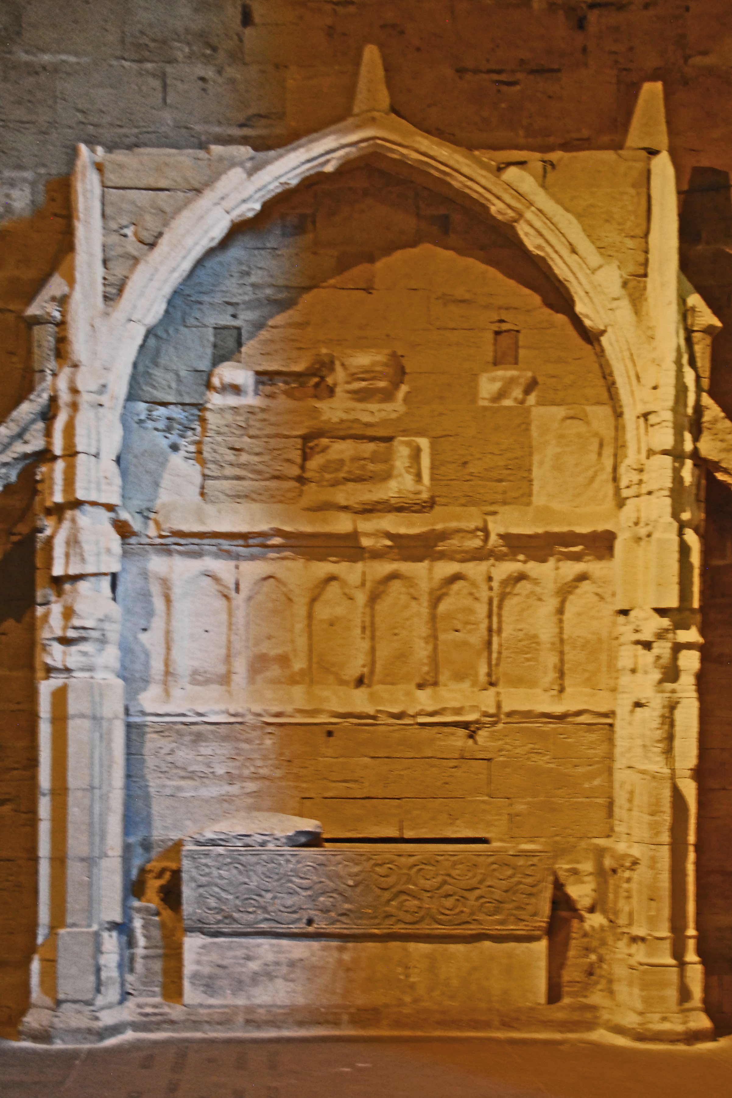 St-Pierre-et-St-Paul de Maguelone, Mausoleum im Nordkreuz